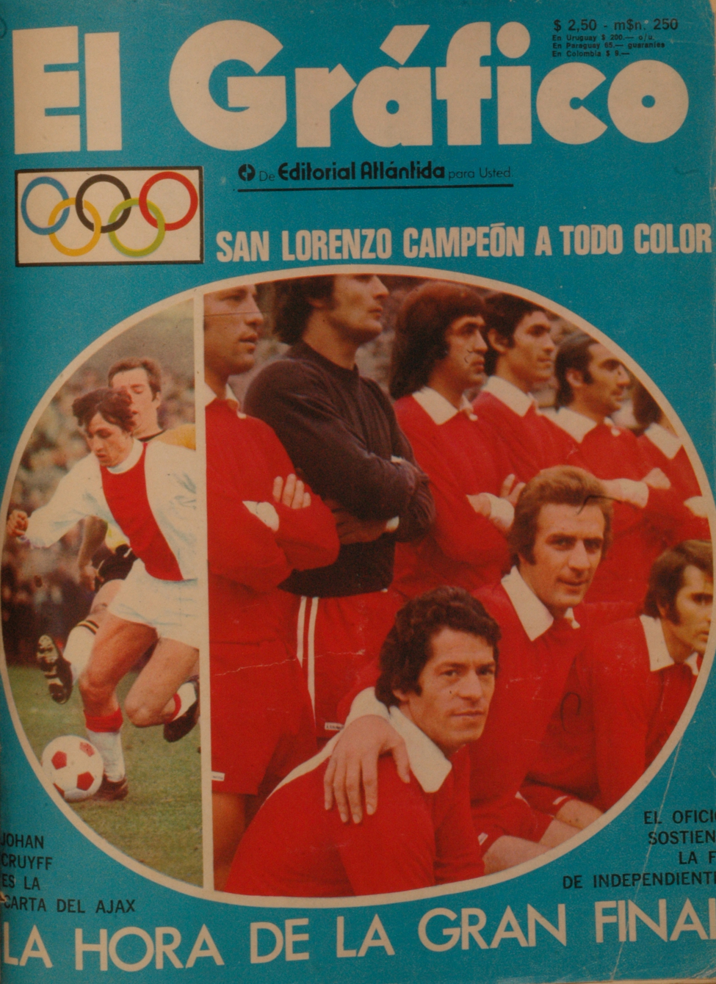 El Grafico del 05 de Septiembre de 1972. Edicion 2761